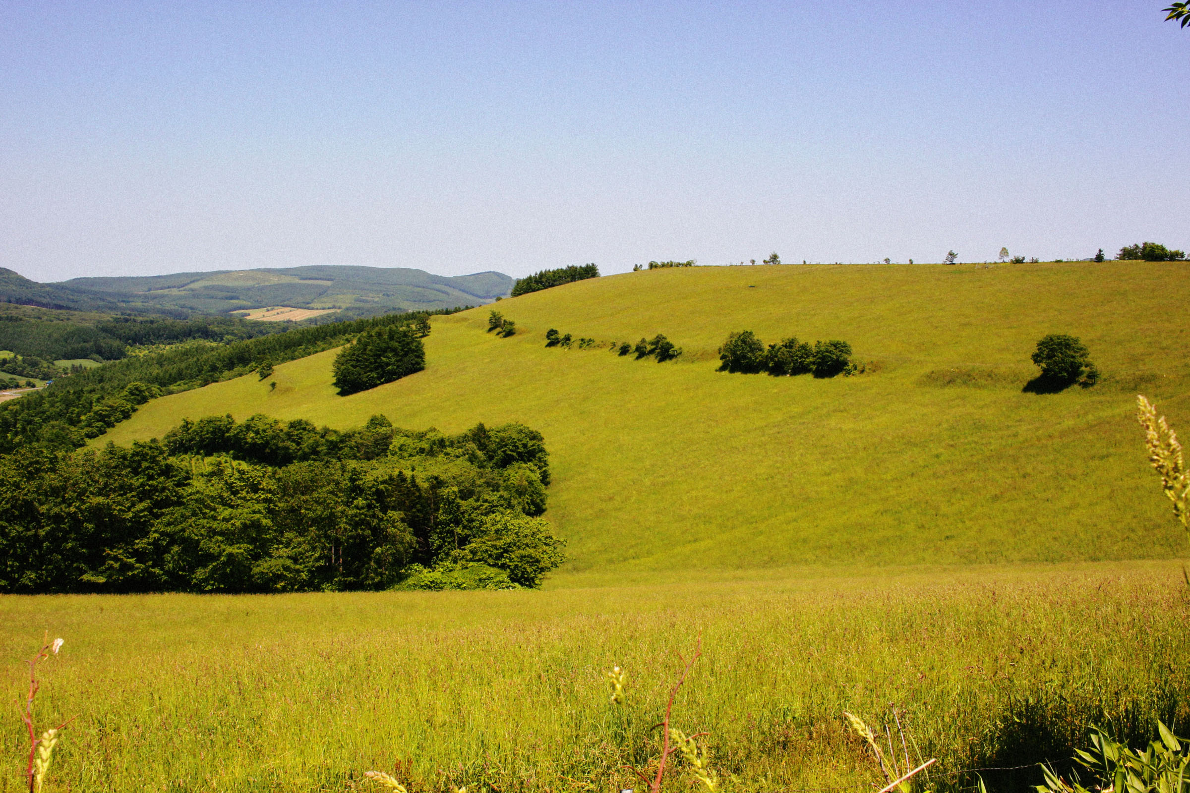 遠軽町見晴牧場